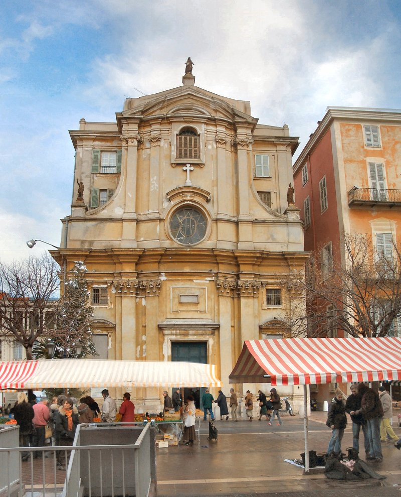 le cours Saleya